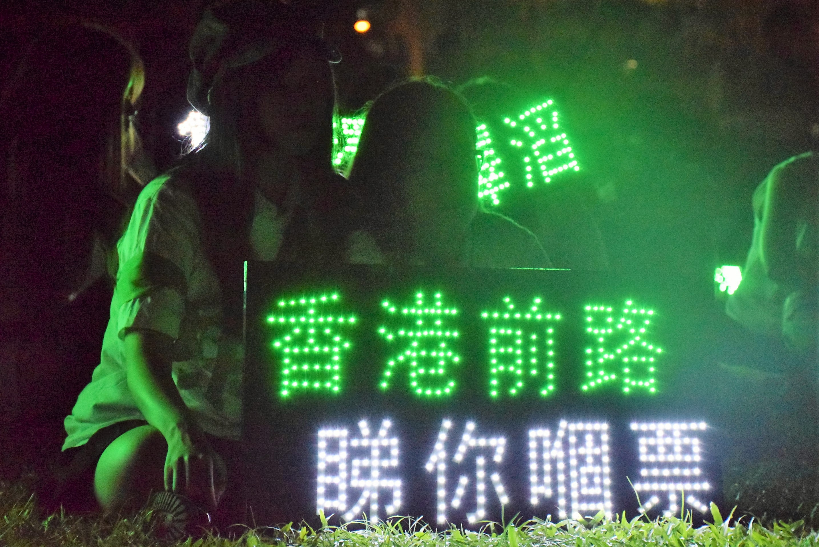 中文（台灣）: ALLinHK選舉聯盟「香港民族備戰大會」參與者展示標語 (美國之音湯惠芸 拍攝)